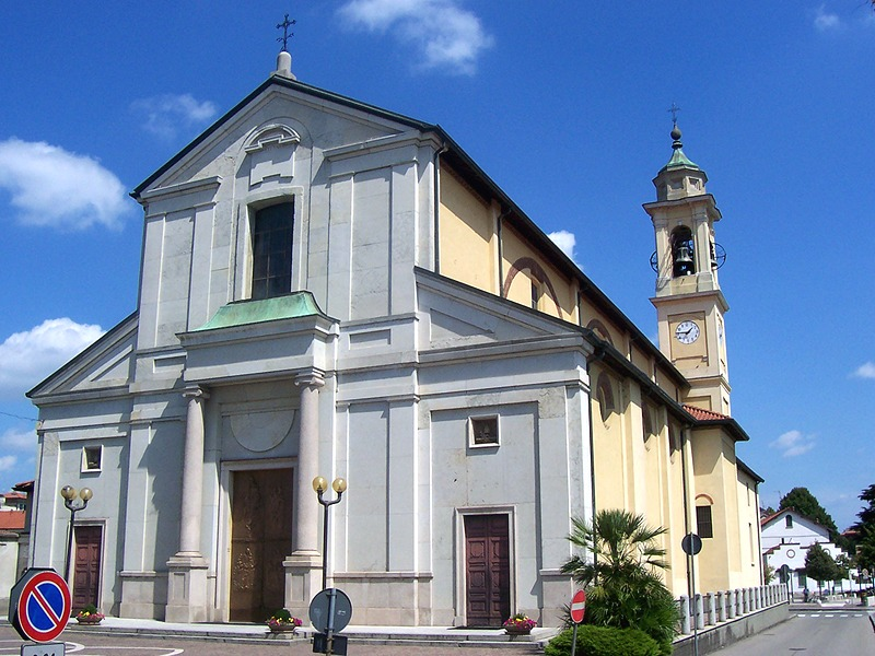 Cambiago - Chiesa Parrocchiale di S. Zenone